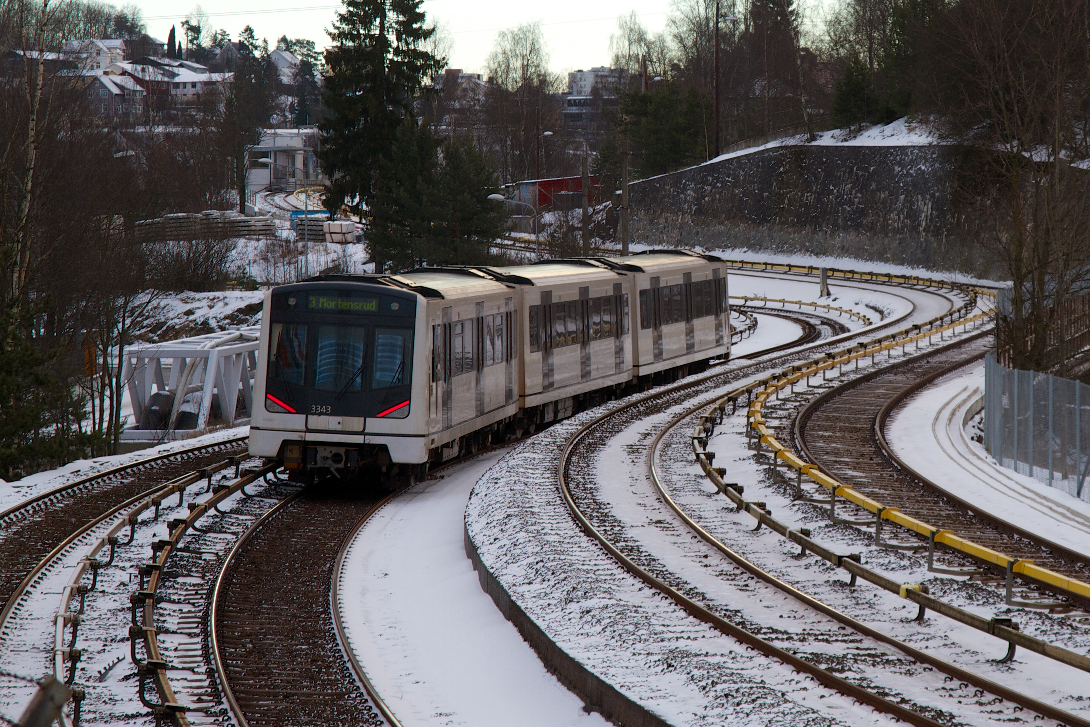 T-bane ved Brynseng